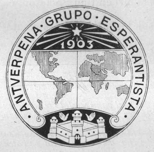 Emblemo de la Antverpena Grupo Esperantista. Ĝi estas desegnita de Raymond Van Melckebeke, la kunfondinto kaj unua prezidanto de la grupo. (Laŭ informo lia nepo, André Van Melckebeke.)